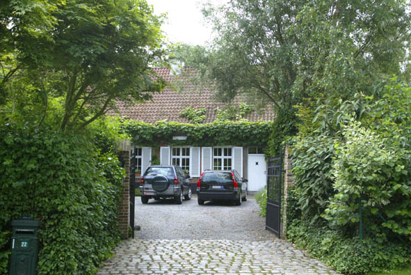 Roosdaal Stampmolenstraat 22